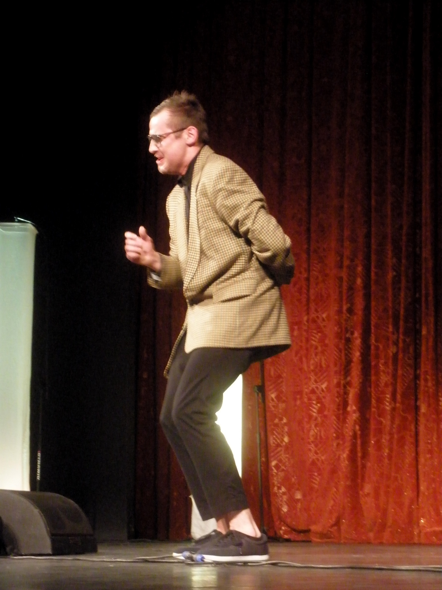 Michał Paszczyk z Kabaretu Paranienormalni podczas występu w Bydgoszczy w lutym 2012.